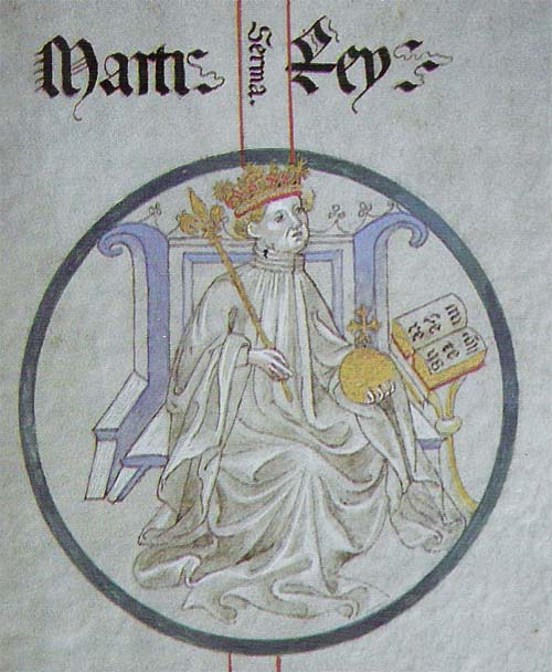 Rotlle genealògic de Poblet